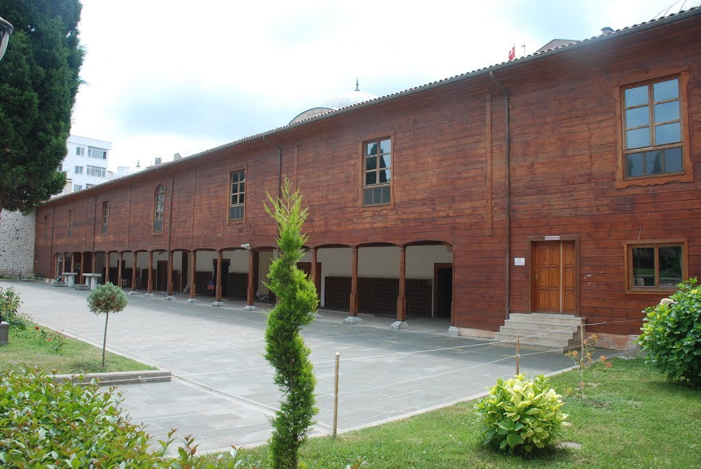 Alaattin Keykubat Camii 1214, Sinop.